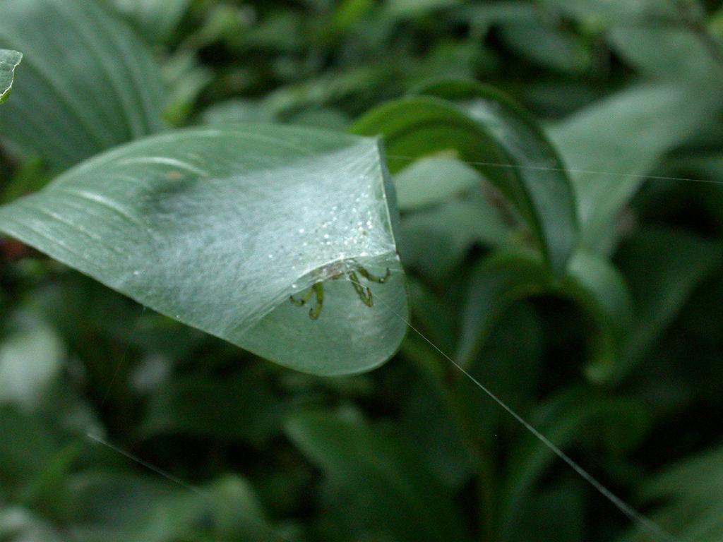 Araneus pentagrammicus：アオオニグモ 葉を巻いた巣に潜む 2002/06/03 和歌山県すさみ町